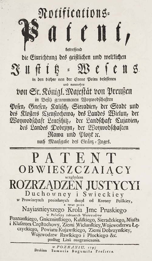 "Patent obwieszczaiący", Poznań 1793